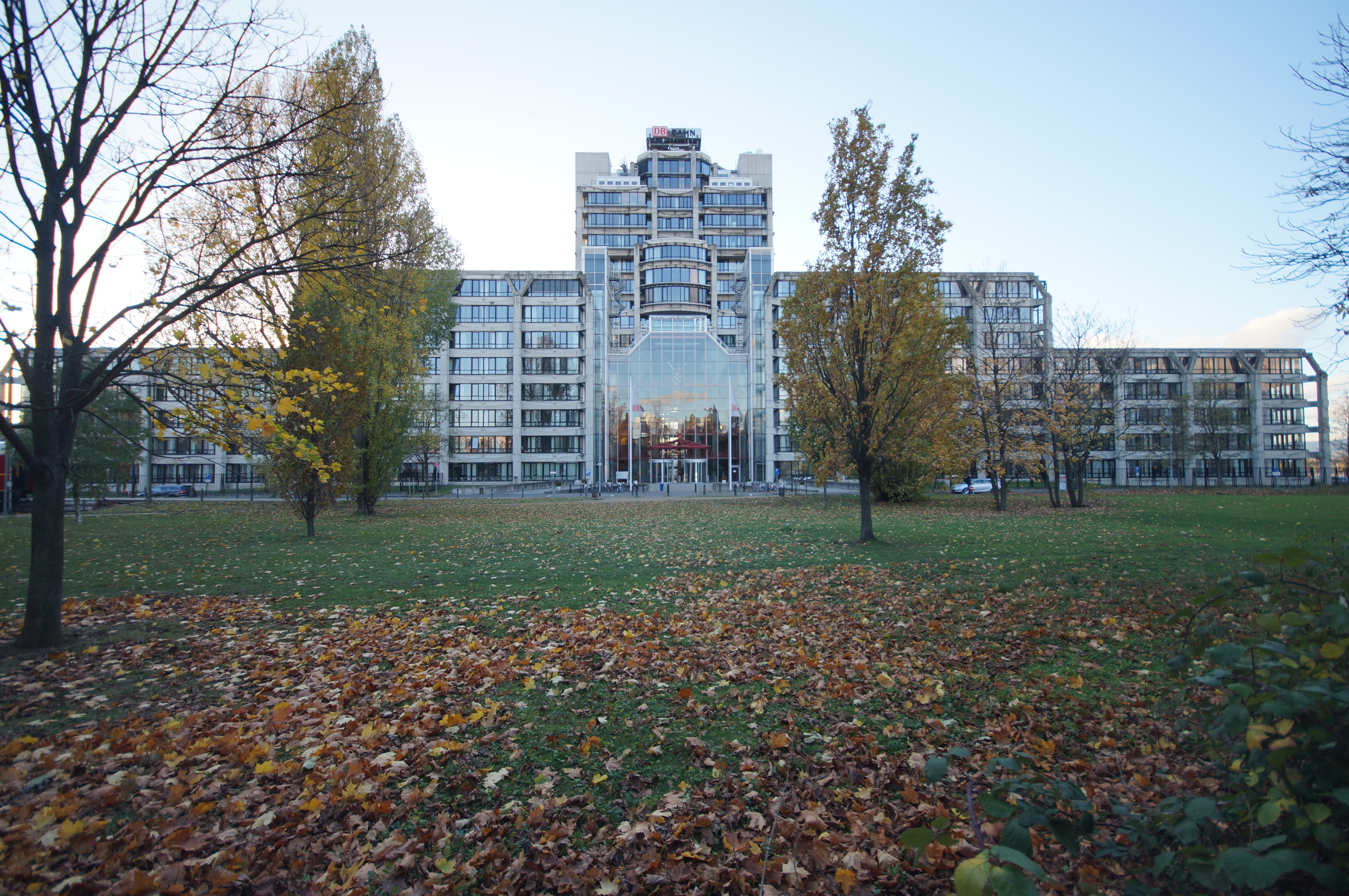 Der Firmensitz von DB Fernverkehr, DB Regio und DB Vertrieb in der Stephensonstraße 1 in Frankfurt am Main